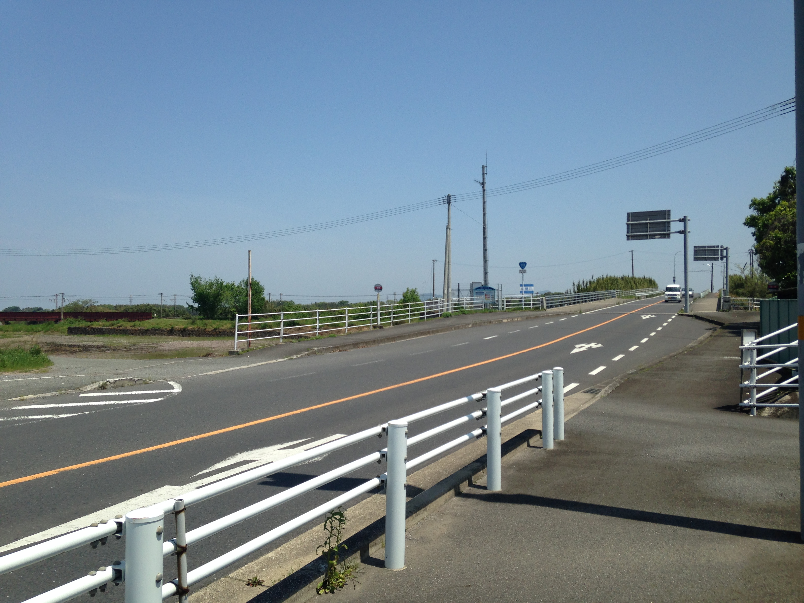 宇佐市岩崎交差点付近の国道213号